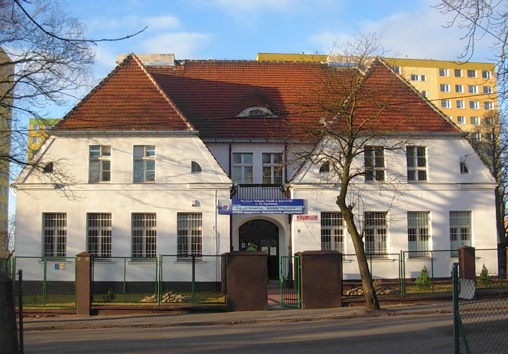 Stara szkoła przy ul. Karpackiej 54 w Bydgoszczy